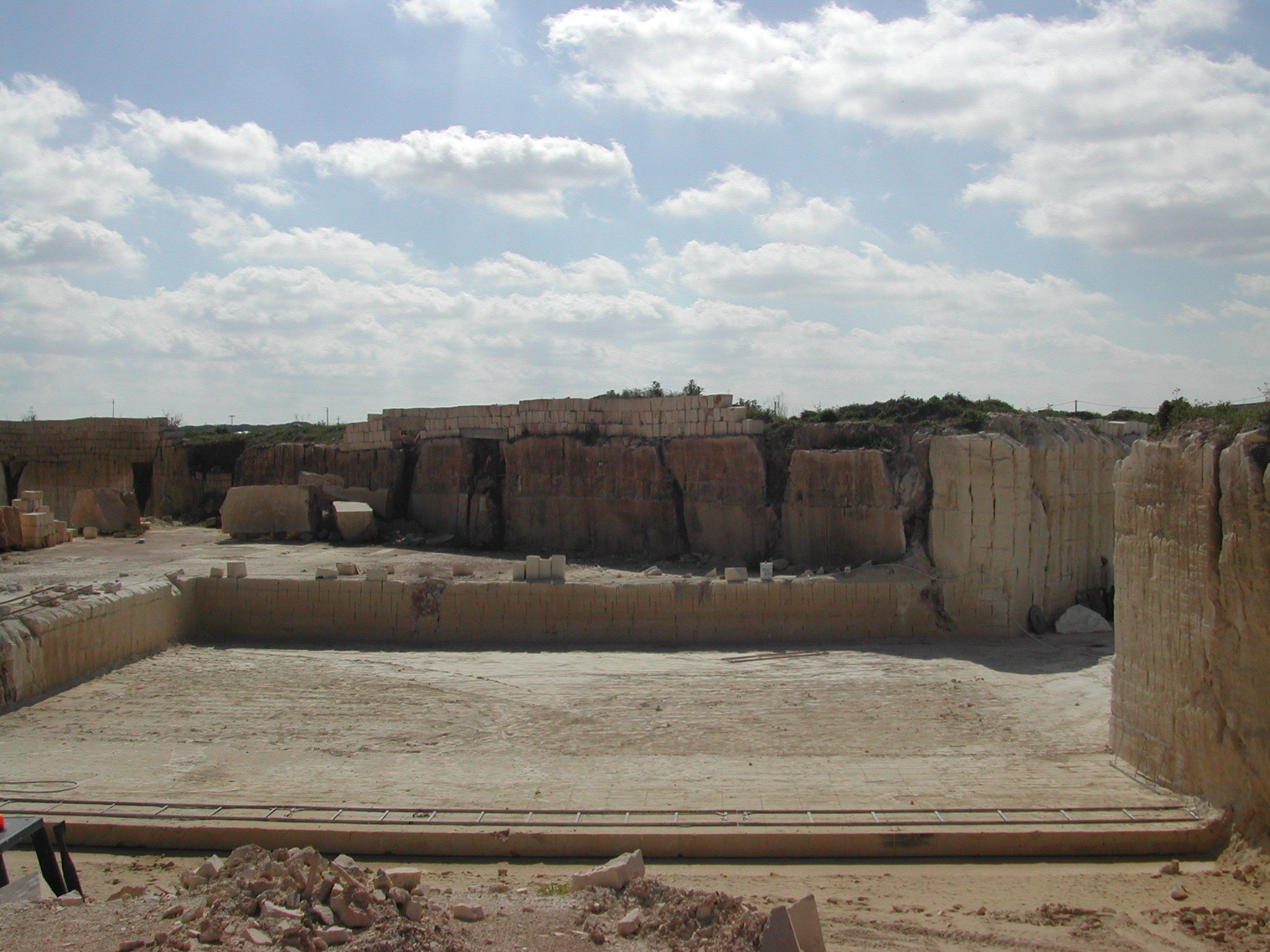 "Leccese stone quarry in Melpignano (Lecce) Italy"